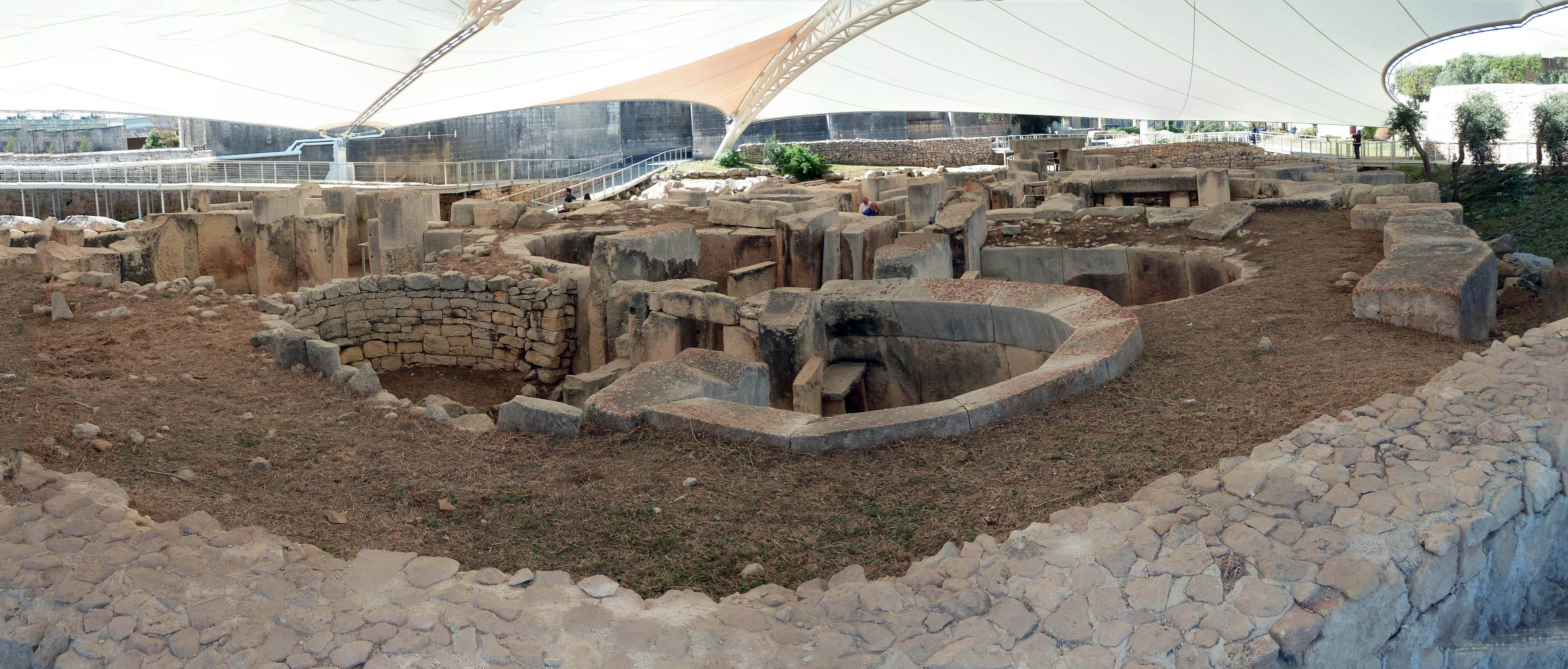 Le temple de Tarxien à Malte.